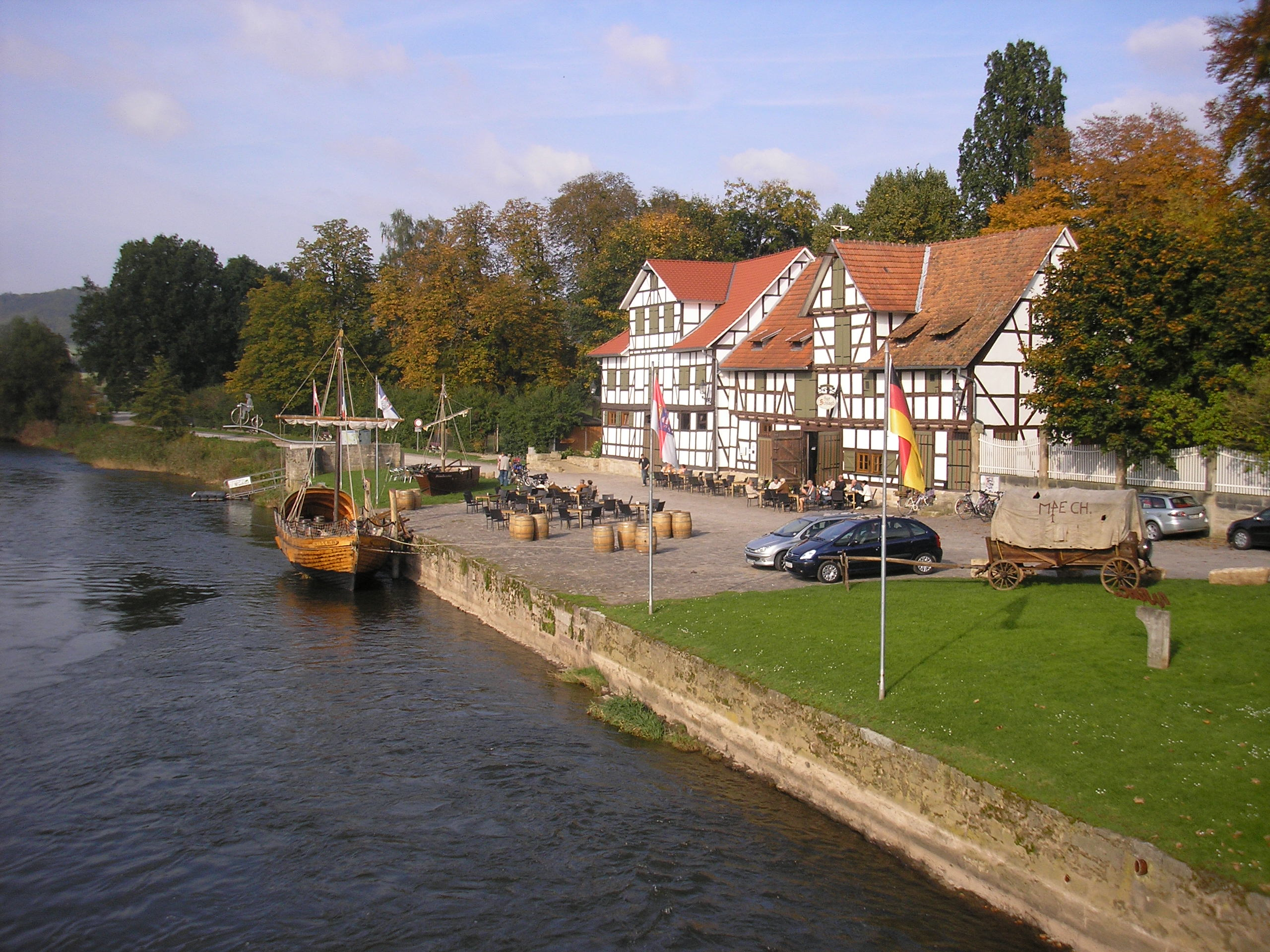 Der alte Werrahafen in Wanfried (Hessen).